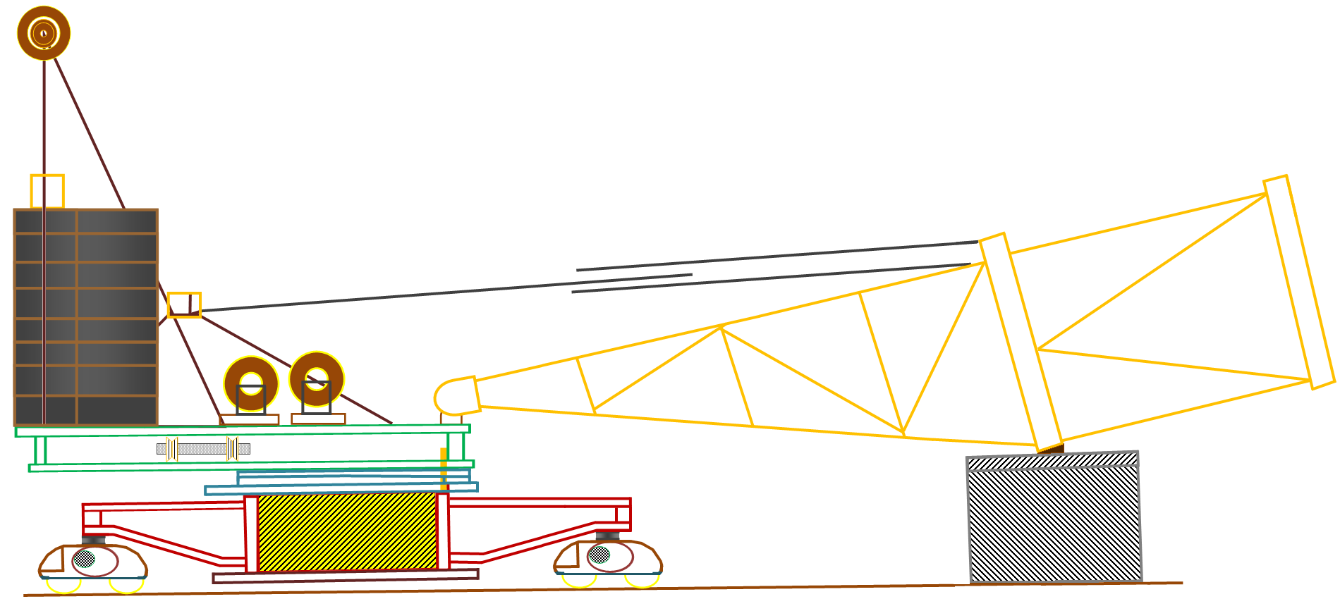 Установка портала КБМ-401